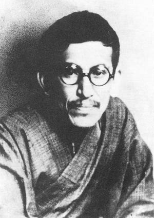 a Japanese painter, 村上華岳 (Murakami Kagaku)